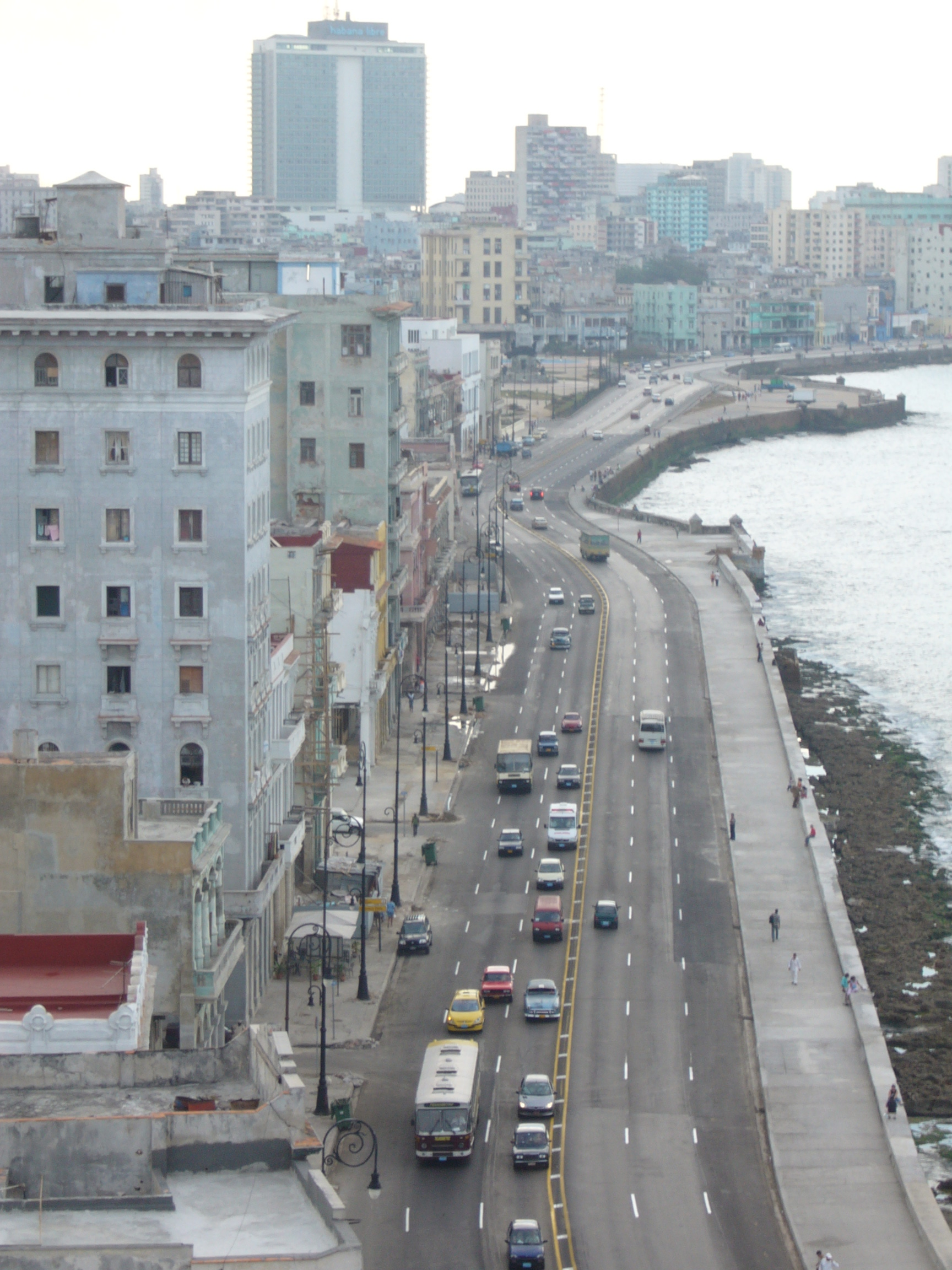 Malécon-rantakatu Havannassa. joulukuussa 2005. Kuva: Jukka Naskali